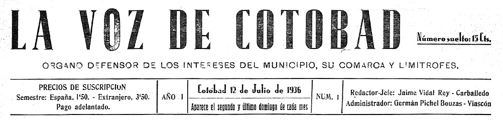 La Voz de Cotobad